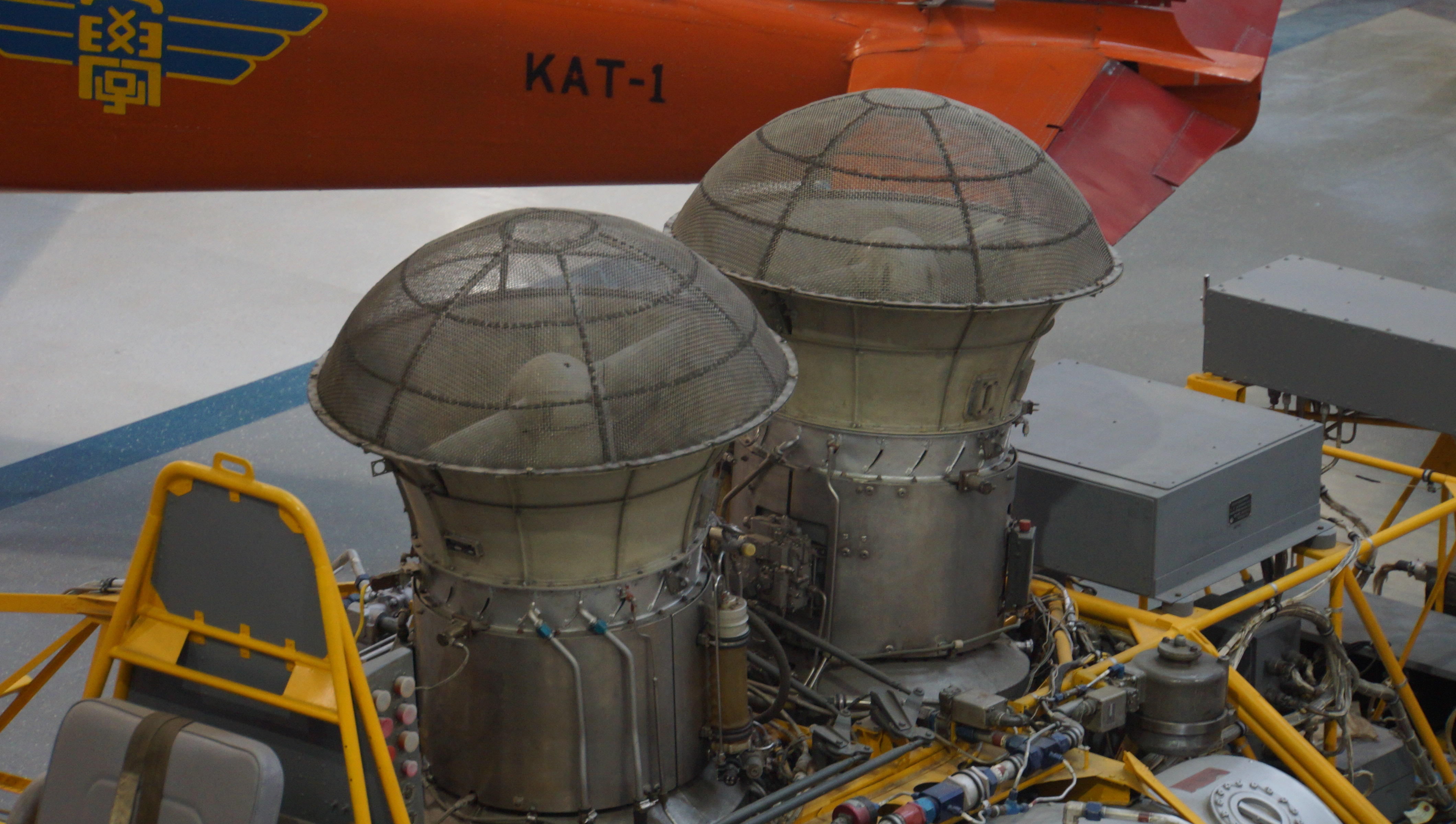 航空宇宙技術研究所（NAL） VTOL実験機フライング・テストベッド JR100Fリフトジェットエンジン。2014年11月2日 かかみがはら航空宇宙科学博物館内にて。